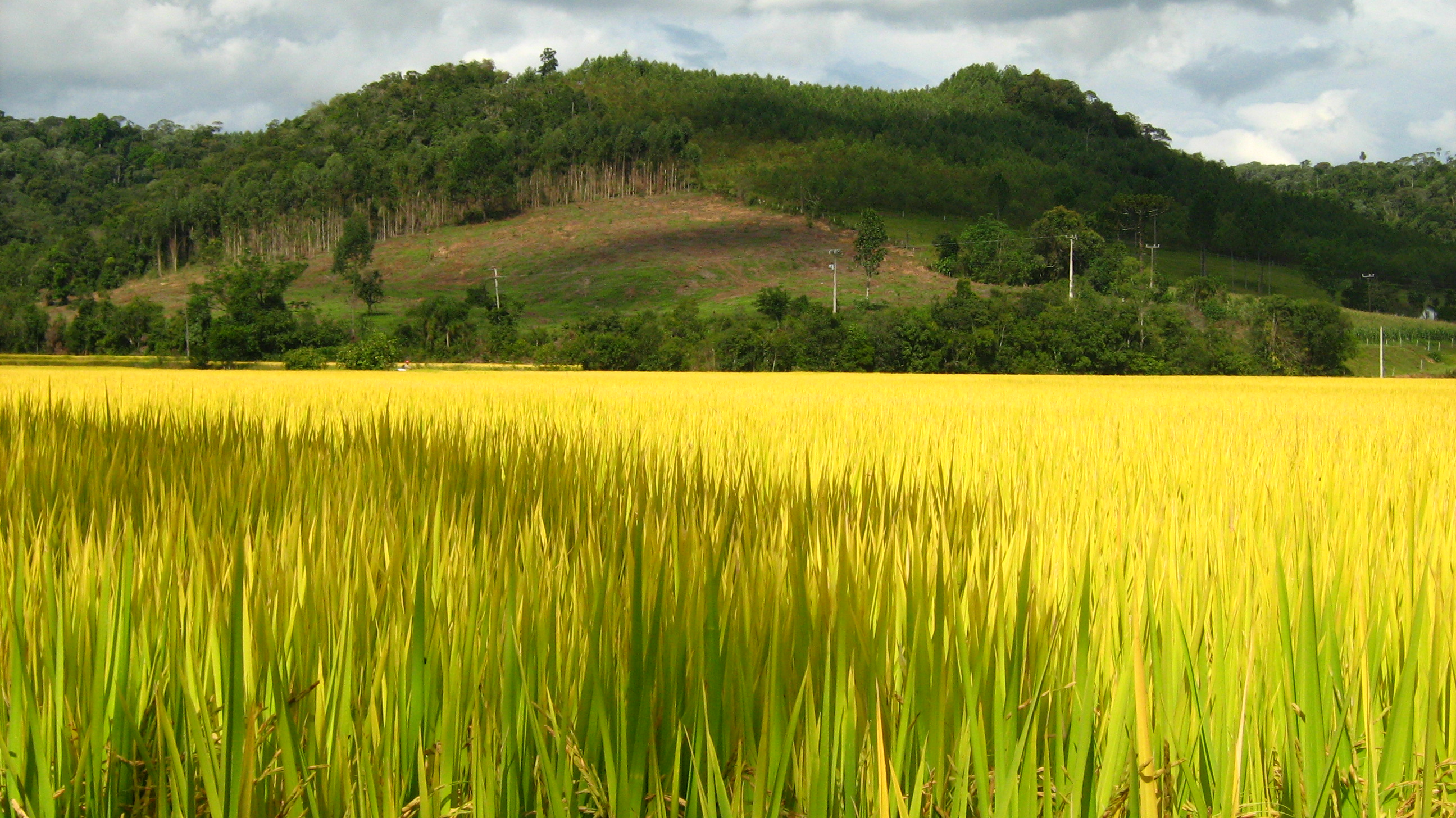 Plantação de Arroz perto de Rio do Sul-SC, Brasil